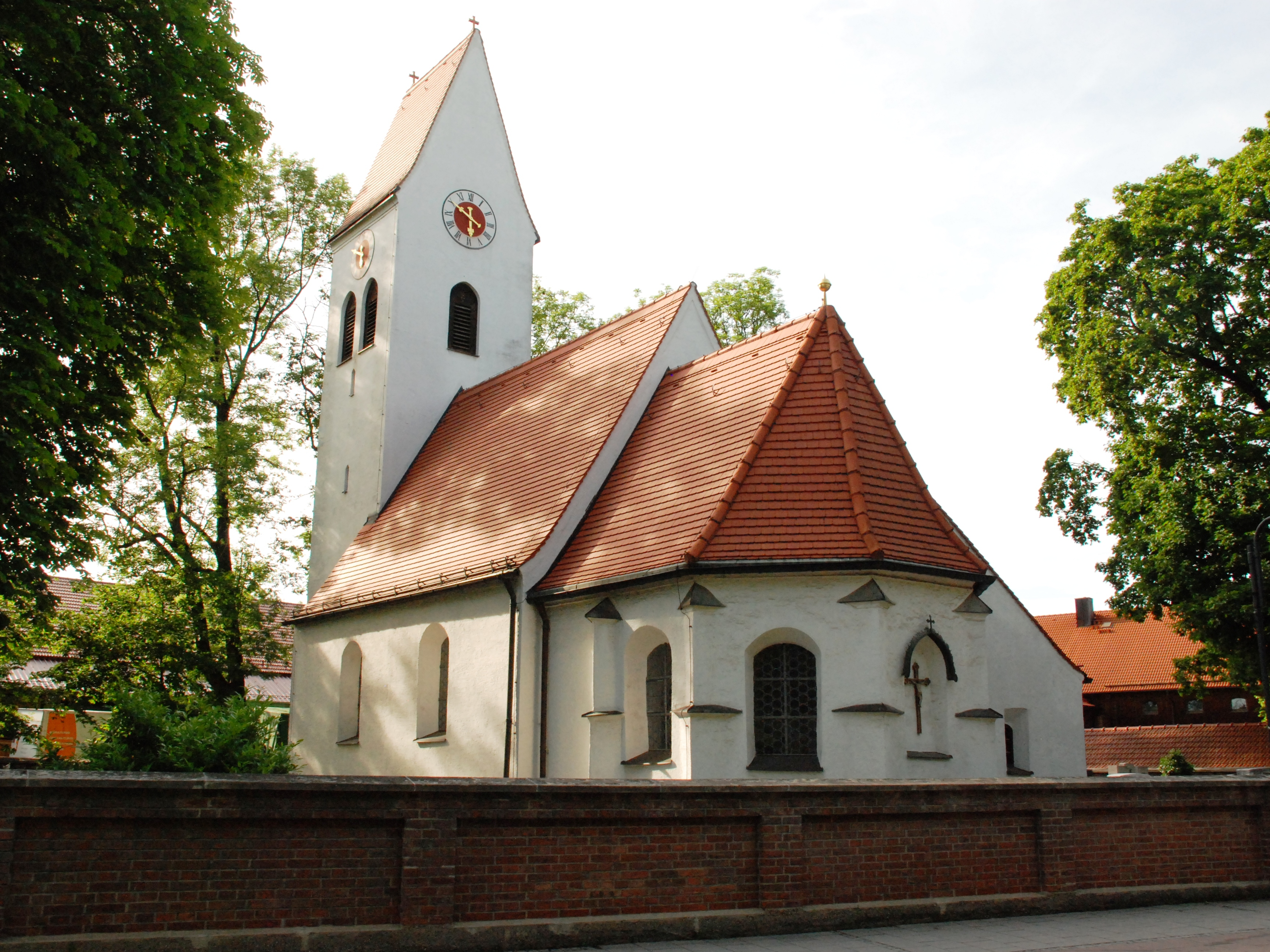 Denkmalgeschützte katholische Kirche St. Margareta in Dornach, Ortsteil der Gemeinde Aschheim, Landkreis München